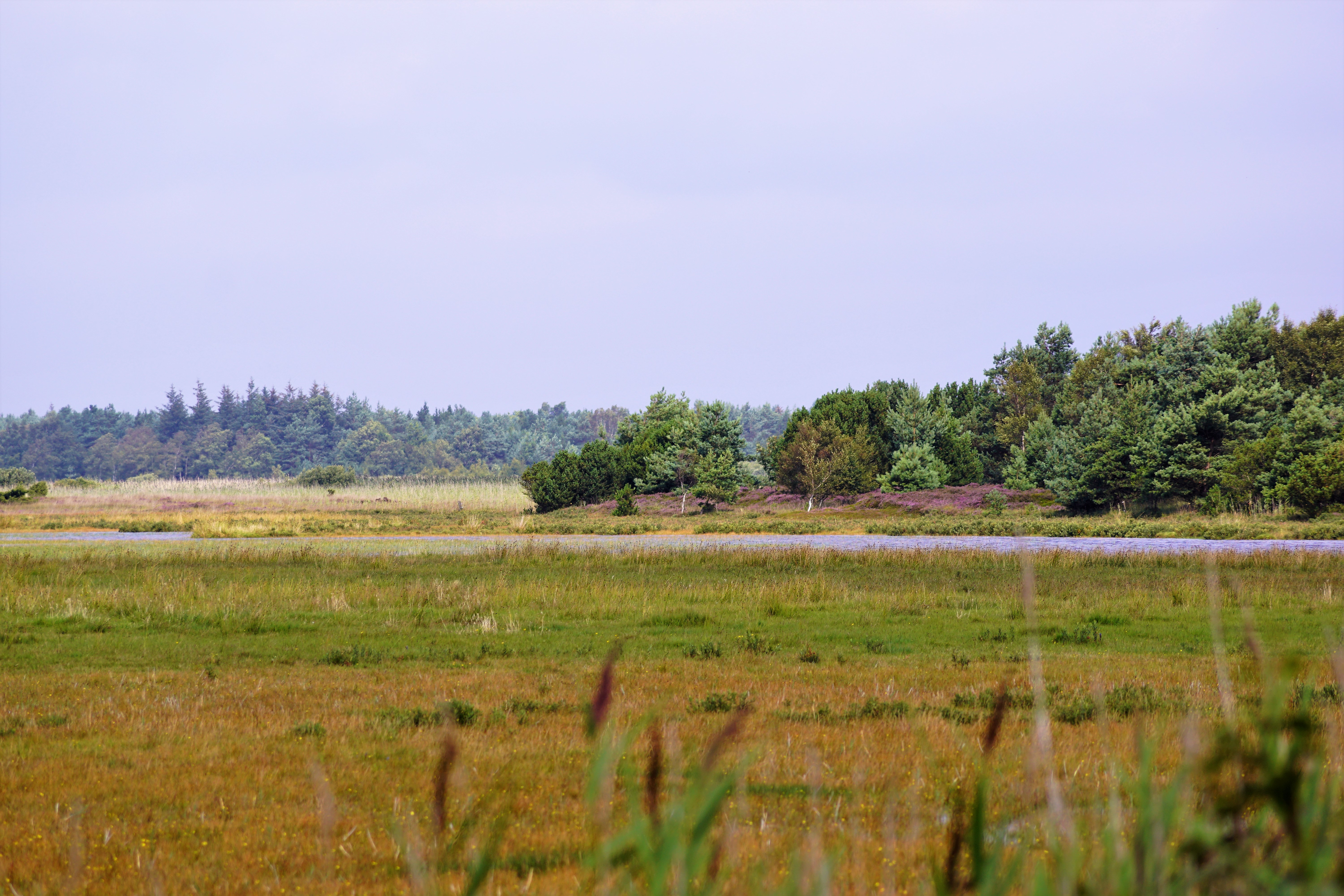 Naturområdet Kærene på Læsø set mod nord